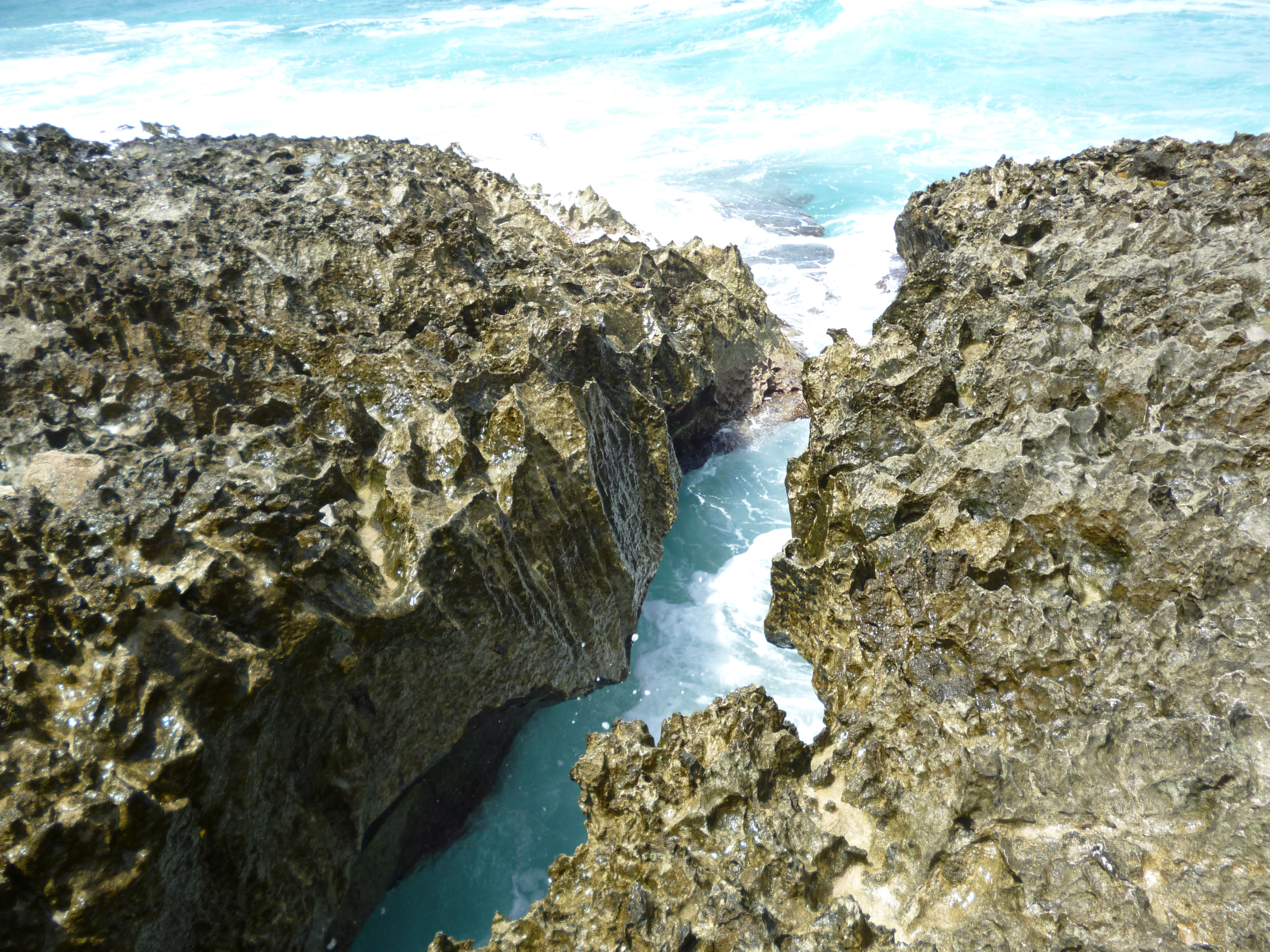 Hoyo soplador